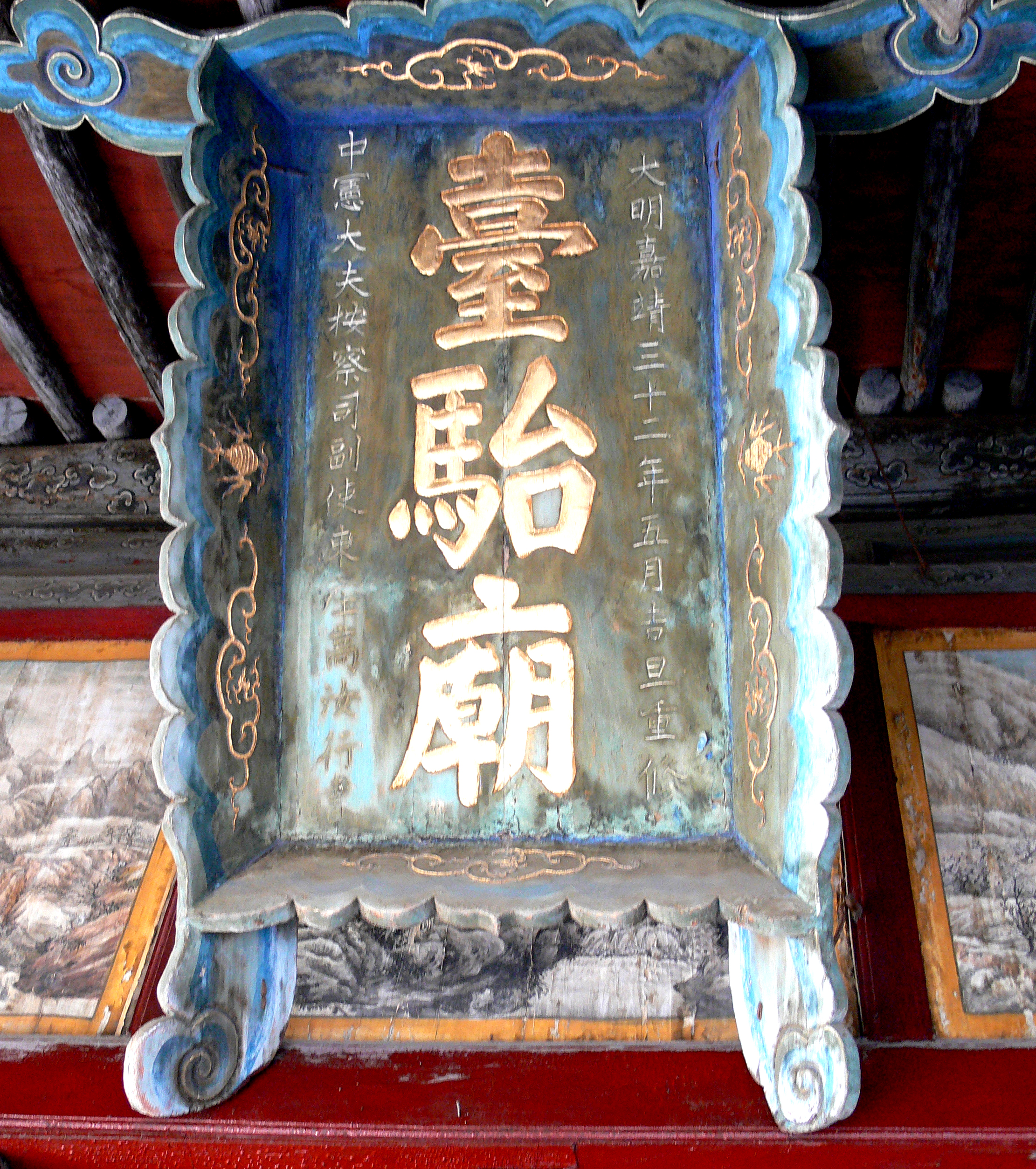 明代嘉靖年间匾额.JPG